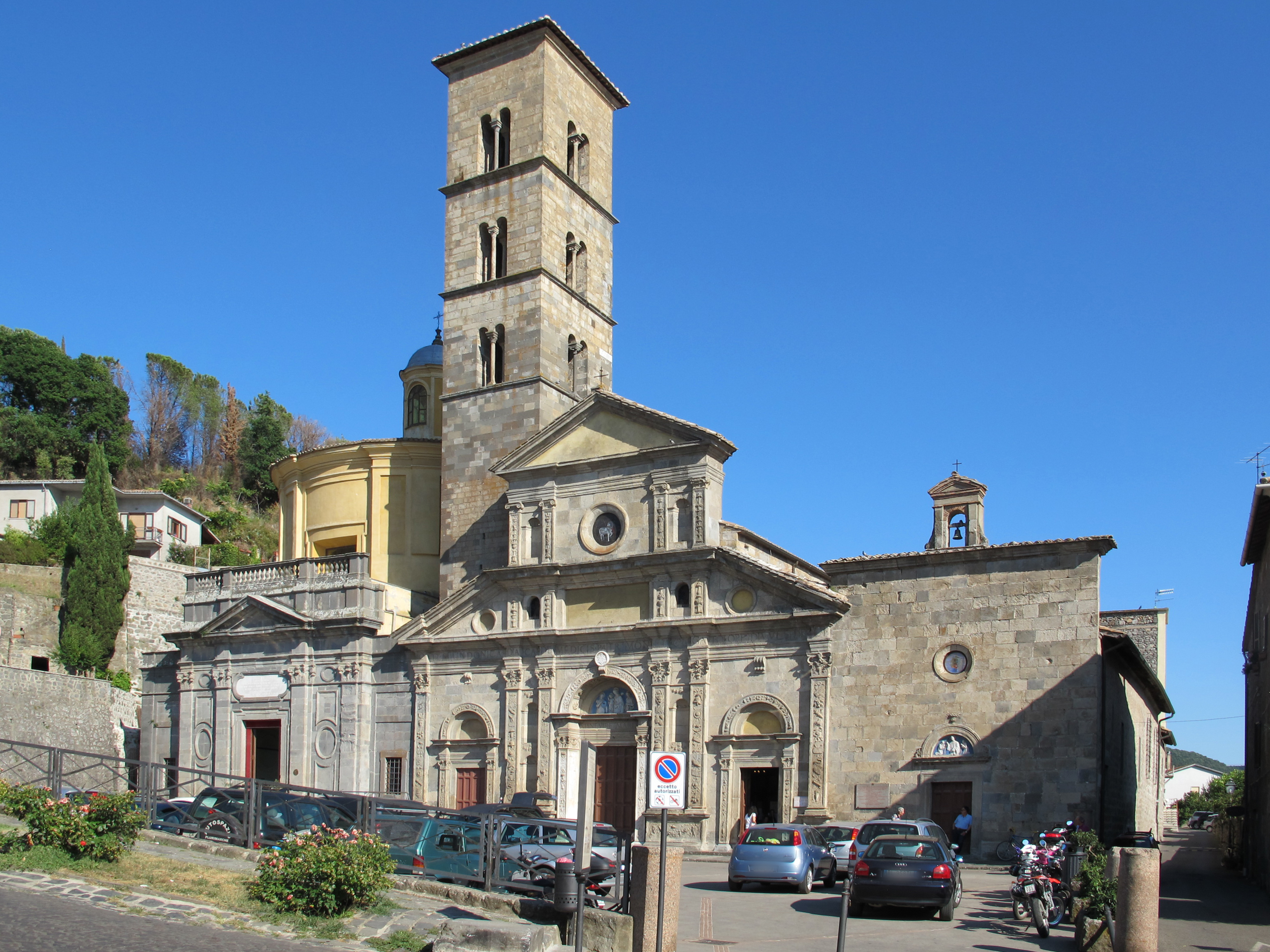 Santi Giorgio e Cristina (Bolsena)